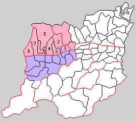 徳島県阿波郡の町村制時点の町村。